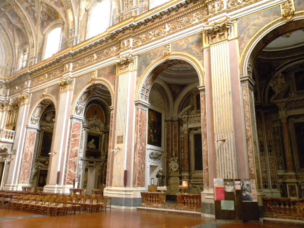 Chiesa dei Santi Apostoli di Napoli Scorcio delle cappelle di destra